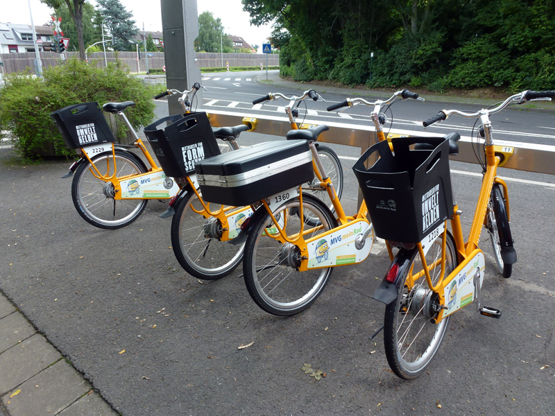 Fahrradverleihsystem MeinRad in Mainz. Hier kann man schön die unterschiedlichen Gepäckträgersysteme erkennen. Zum einen geschlossene Koffer oder offene Körbe